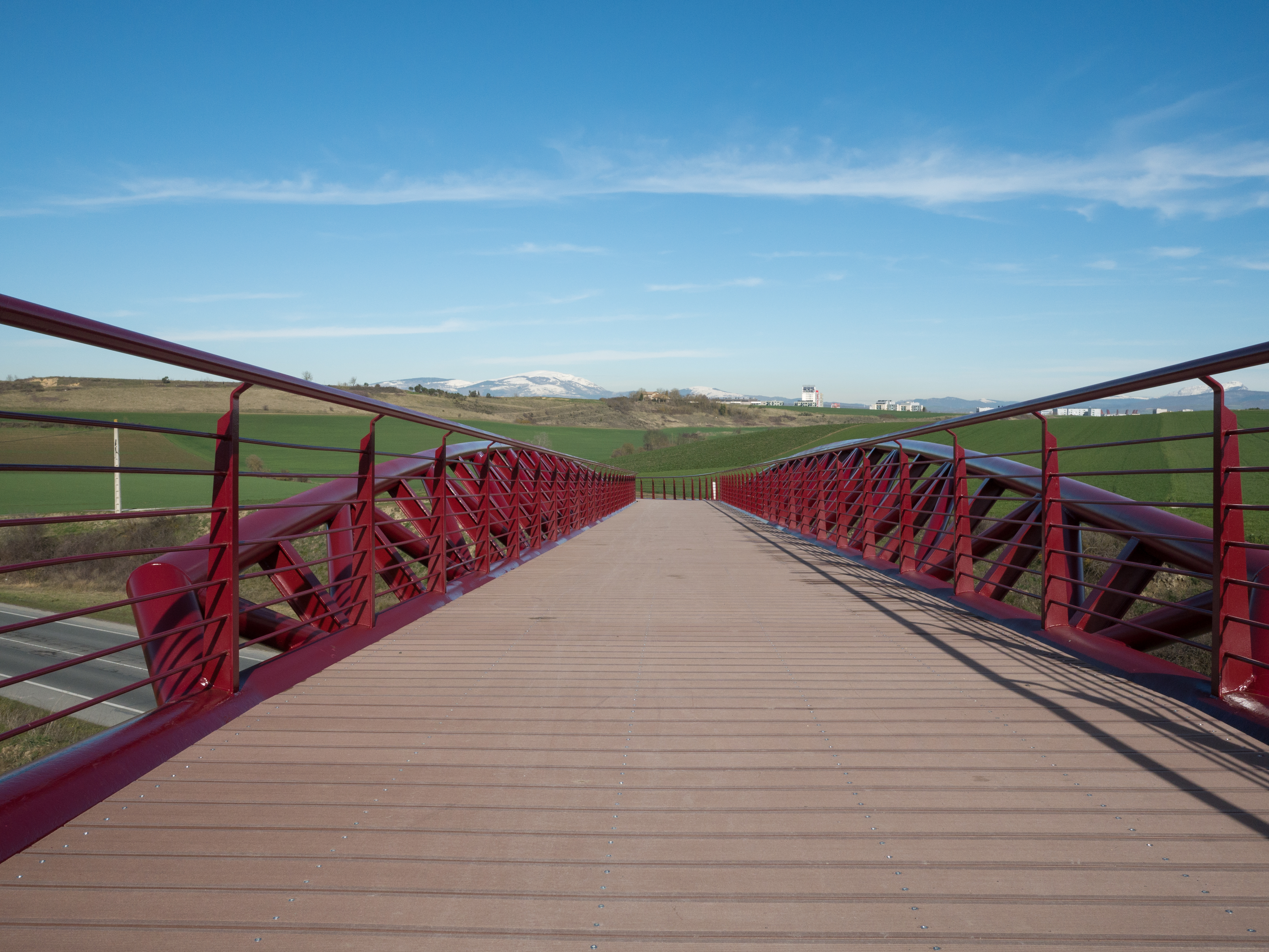 Puente de Olaranbe en la Vía Verde del Vasco-Navarro. Vitoria-Gasteiz, País Vasco, España